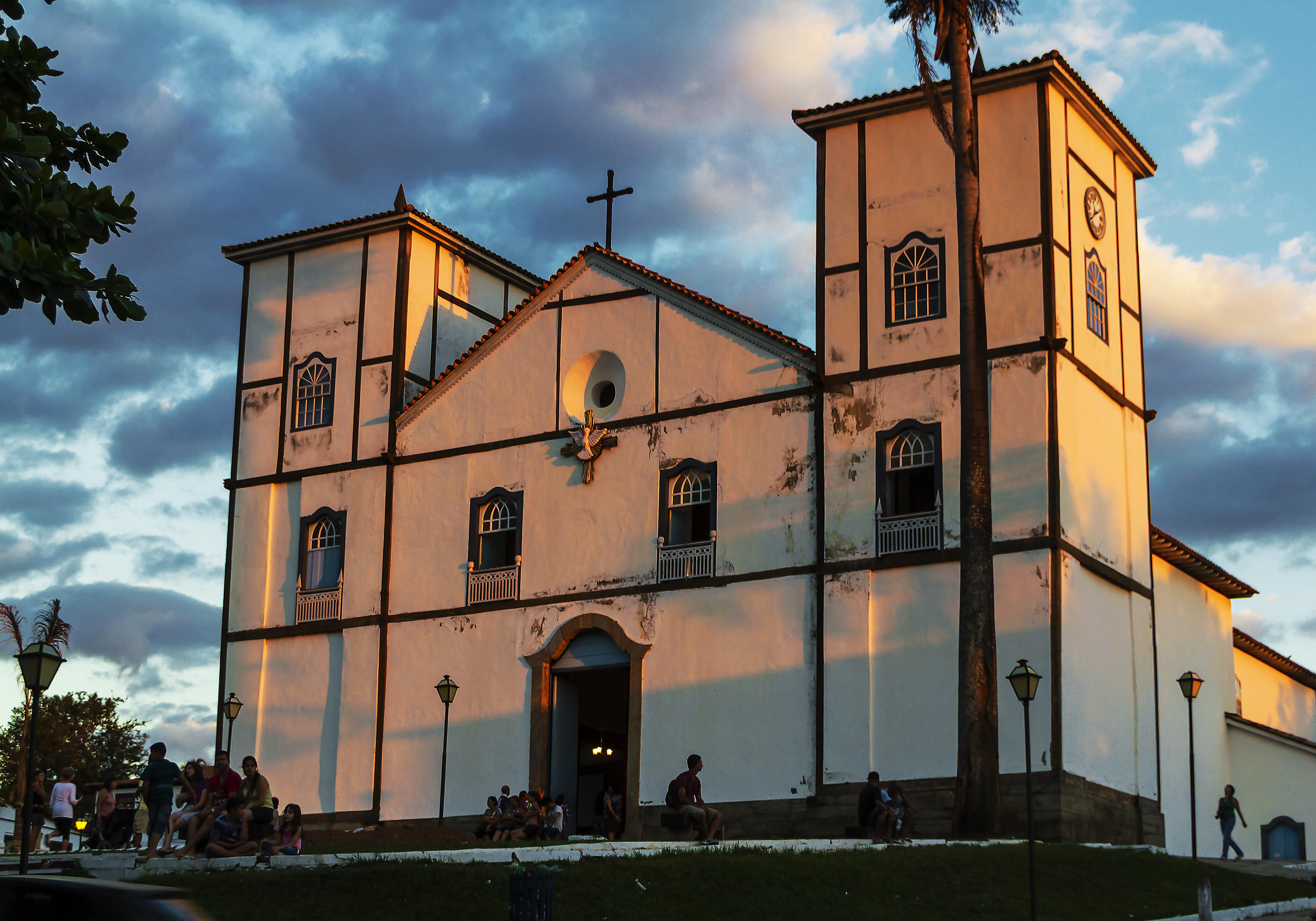 Igreja Matriz na cidade histórica de Pirenópolis, Trindade, Goiás.